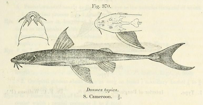 Doumea typica